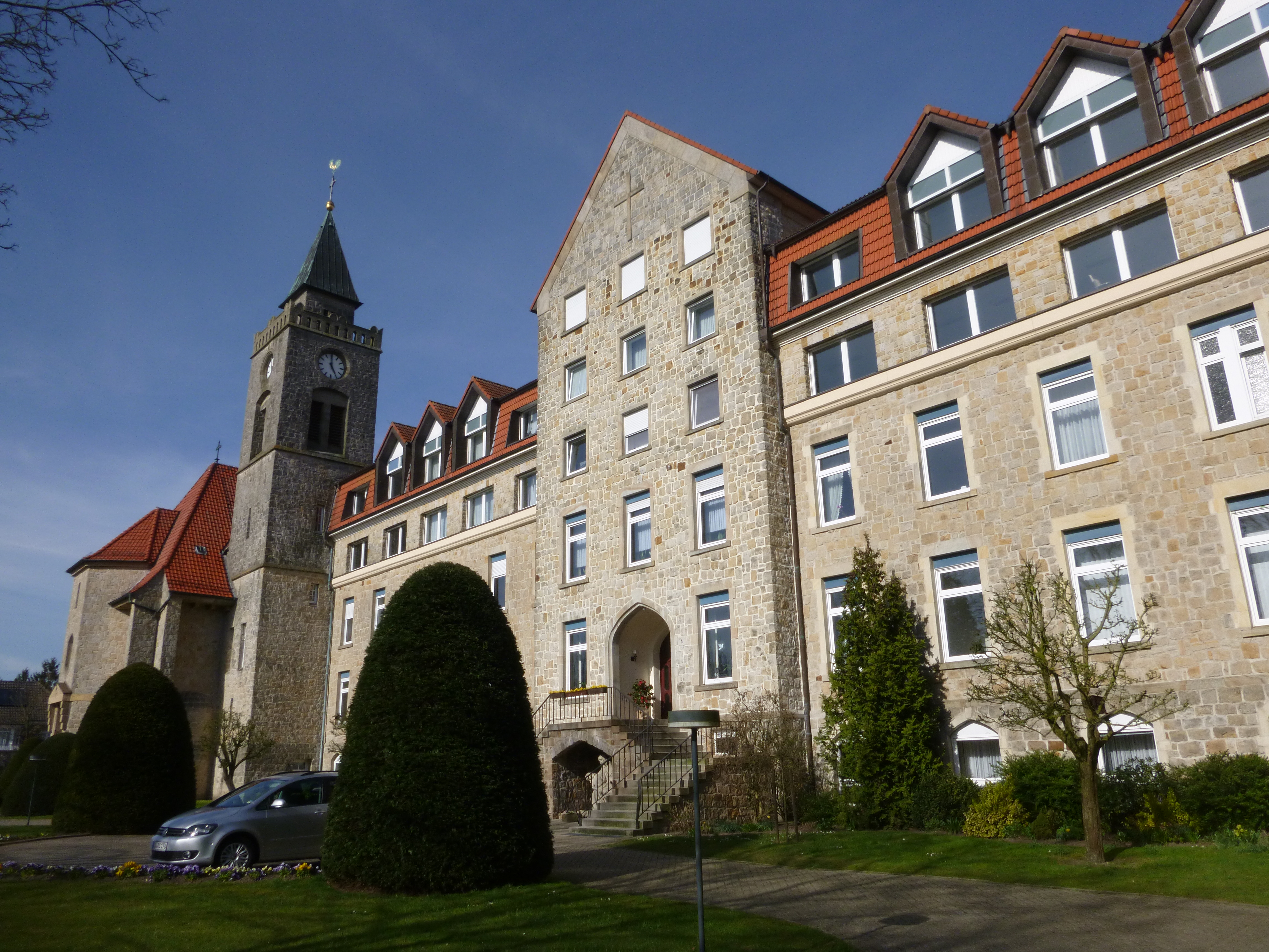 Gimnazio Leoninum en Handrup, Malsupra Saksio, Germanio